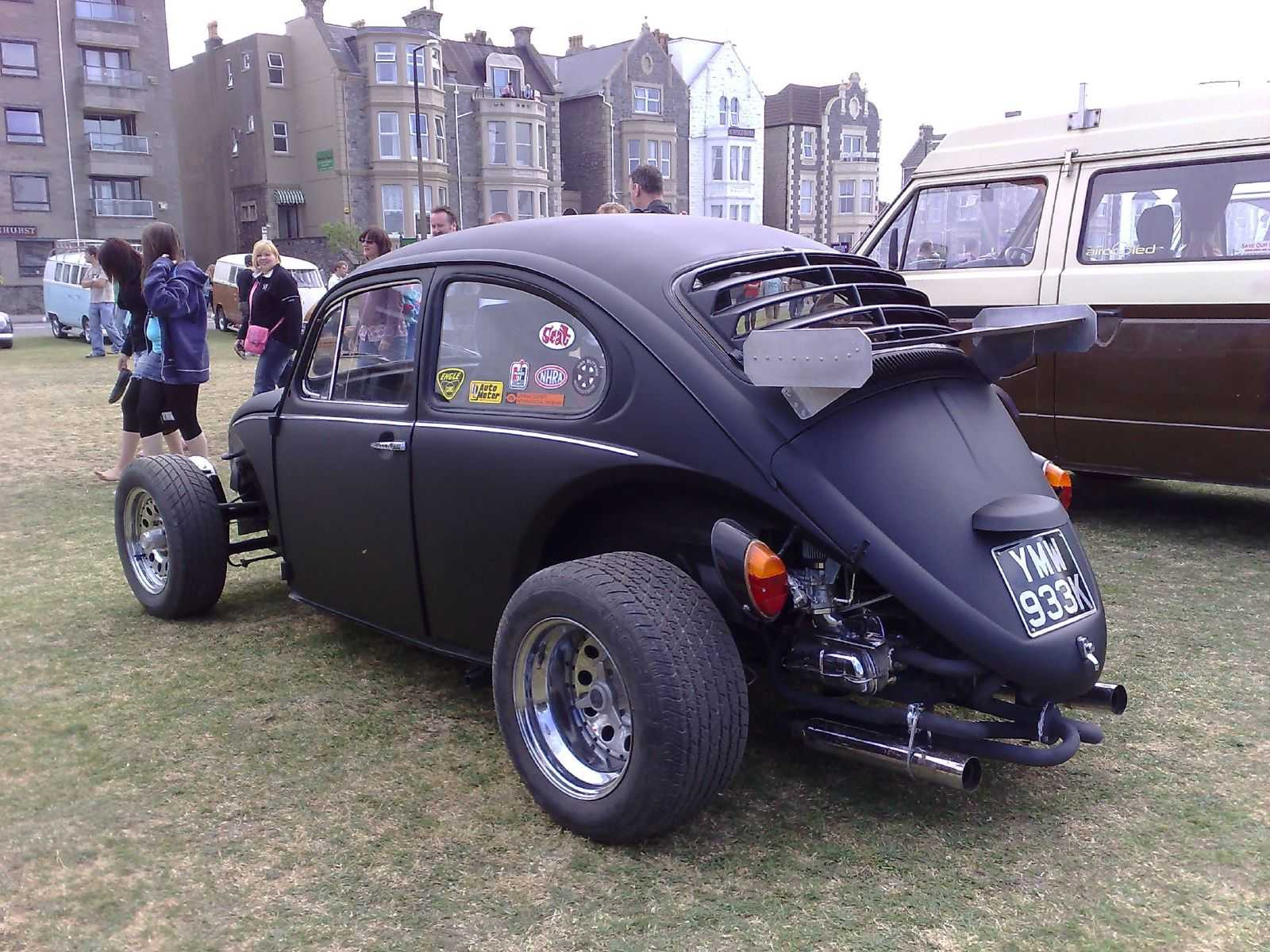 VW Beetle Hot Rod!